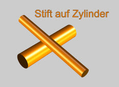 Verbindung Stift auf Zylinder